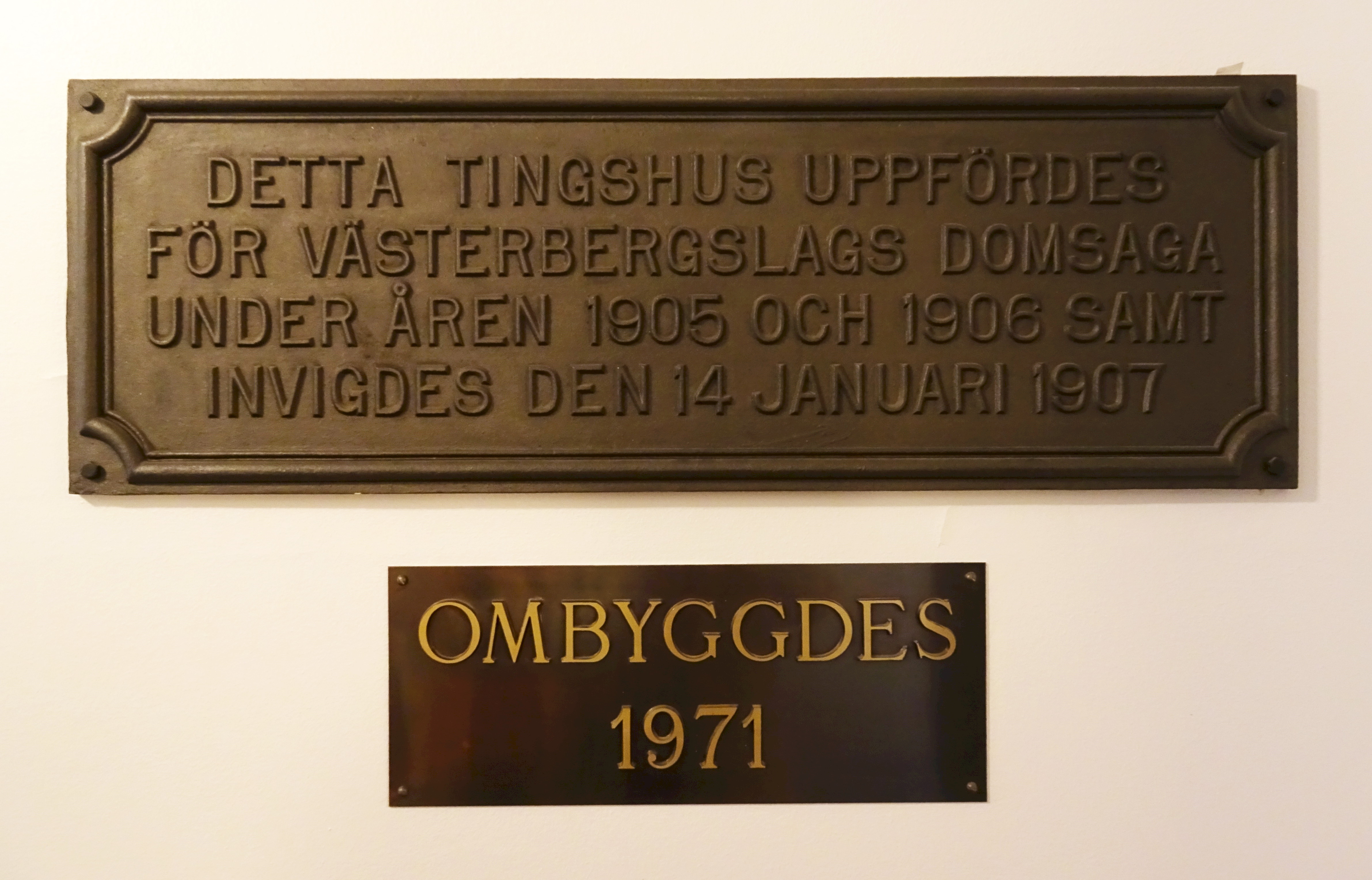 Gamla Ludvika tingshus, interiör